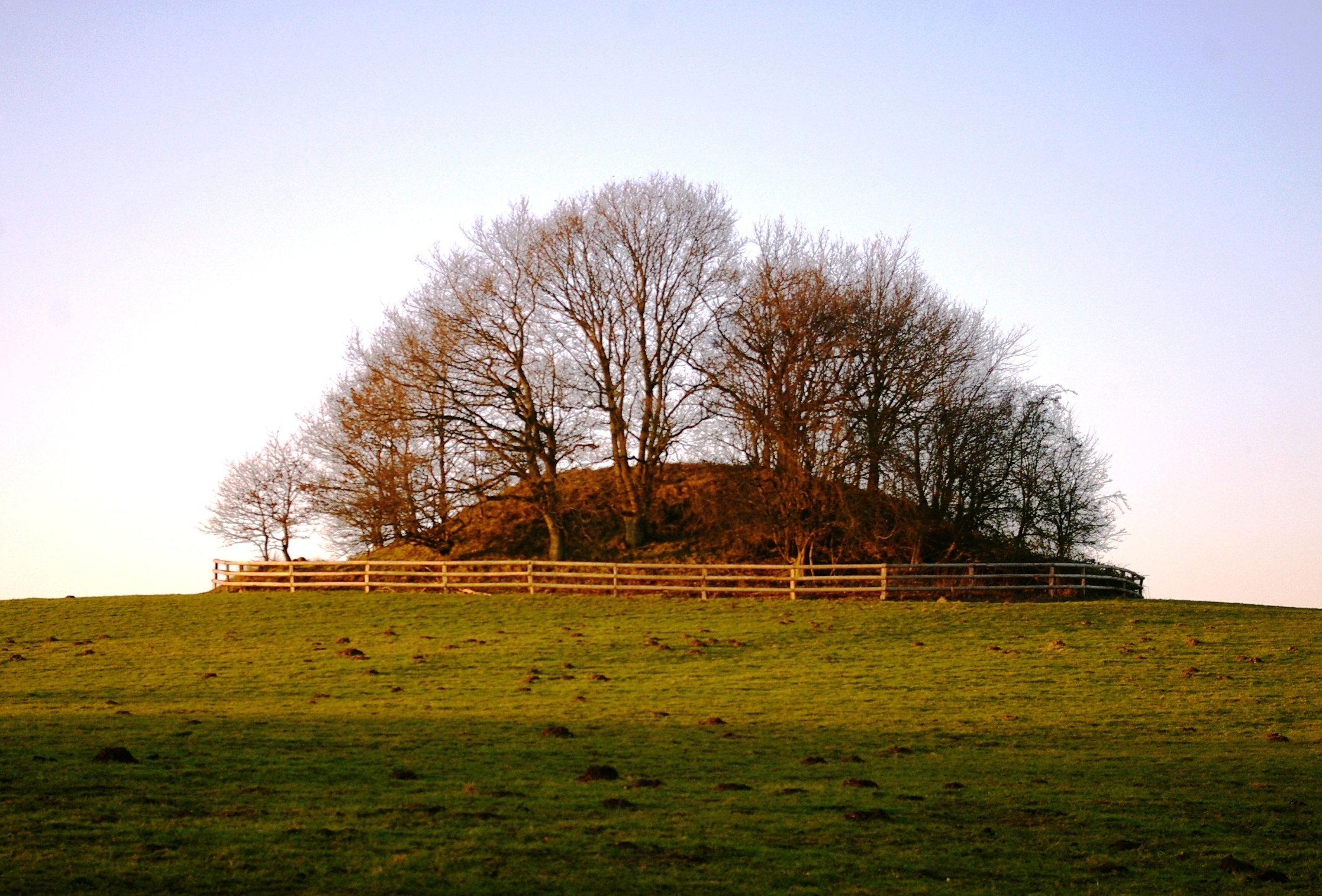 "Goldbarg": Bronzezeitliches Hügelgrab im Ortsteil Blocksdorf von Langwedel (Holstein)